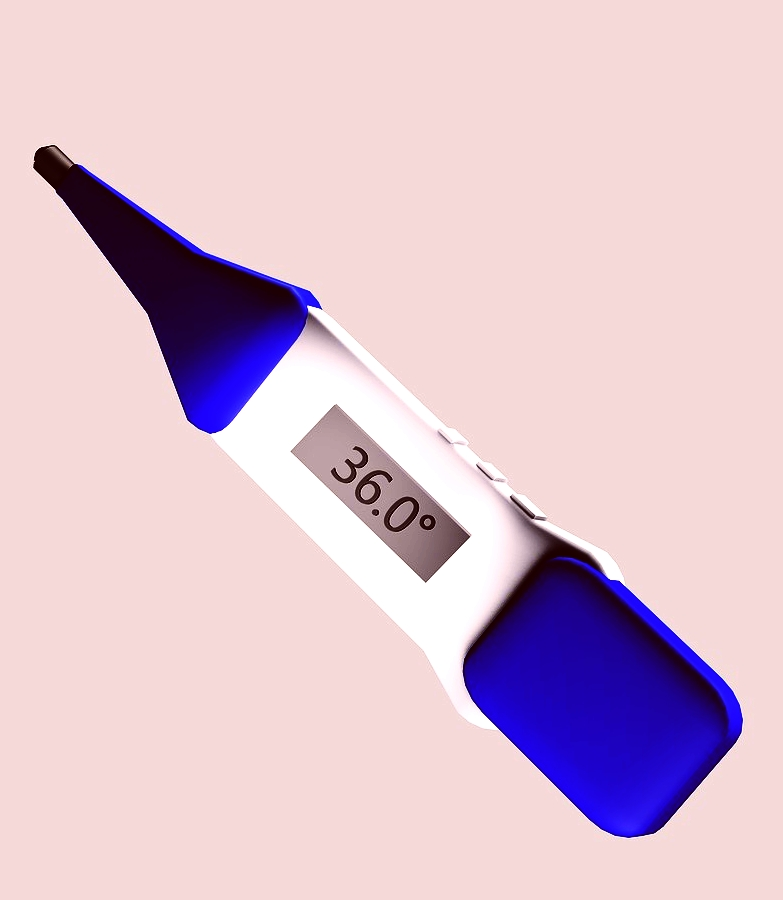 Lekársky teplomer